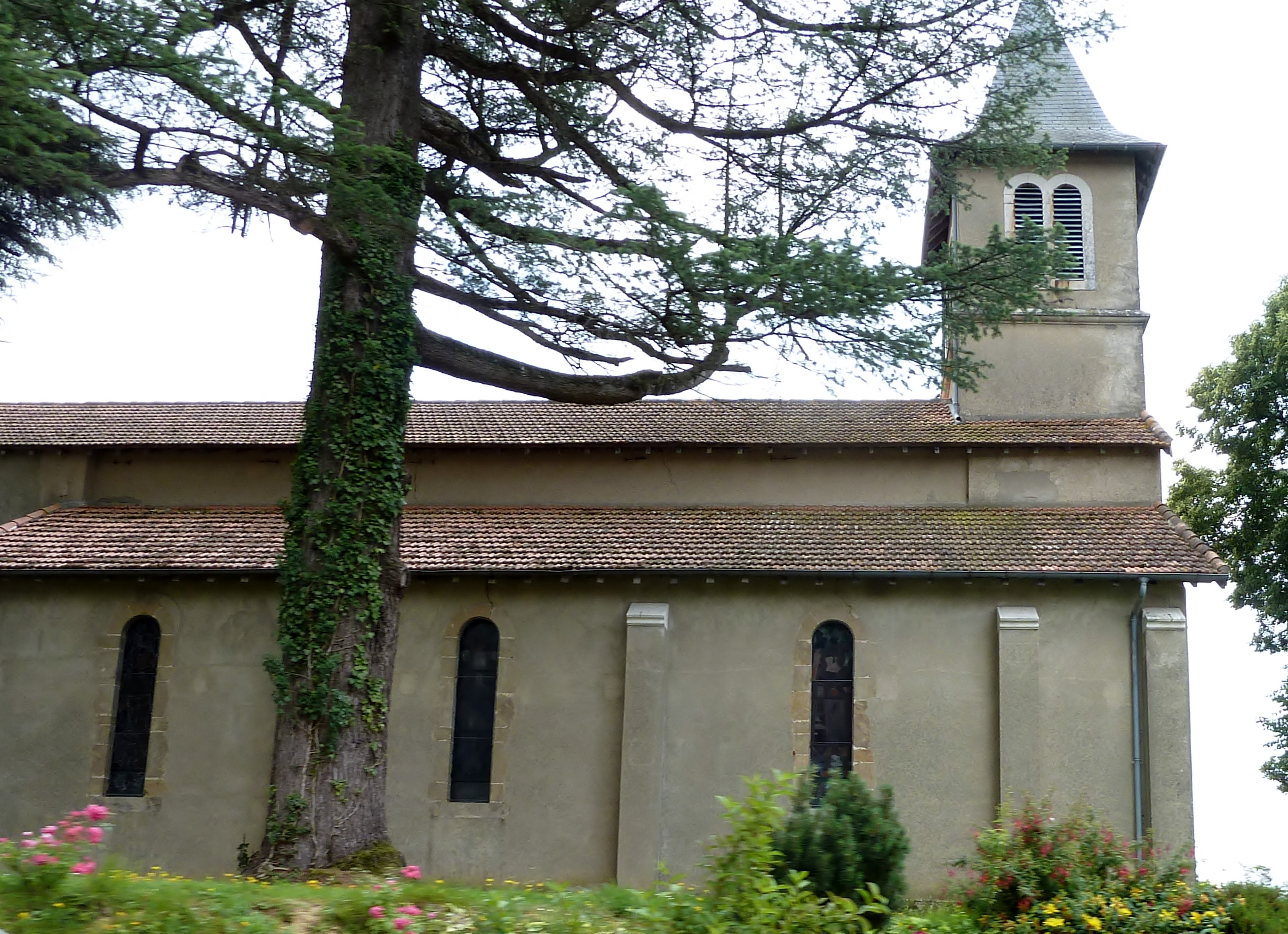 Église de Moncaup (Pyrénées-Atlantiques)